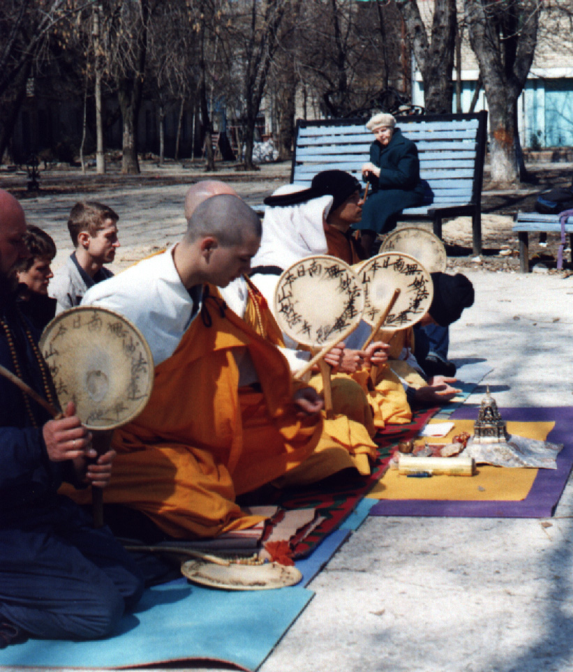 New religious movement (Ukraine) Мехасангха Ніппондзан Мьоходзі